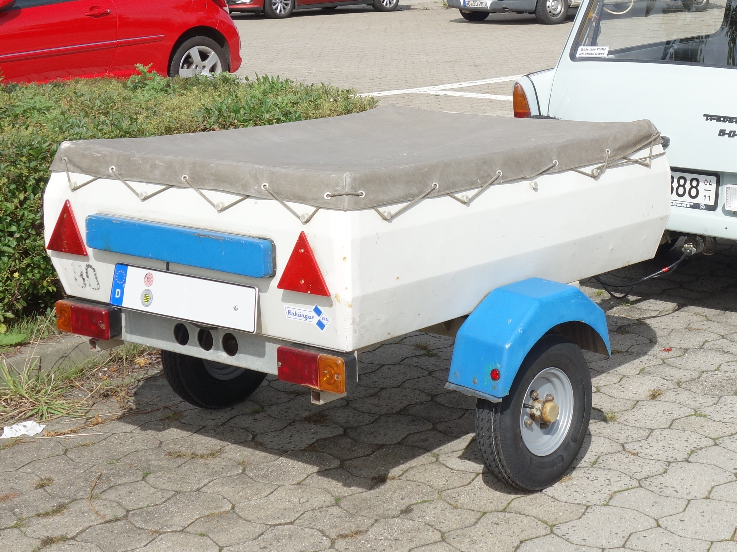 HP 350 in Chemnitz, 2017